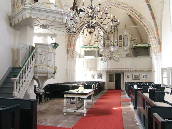 Innenraum der Eilsumer Kirche